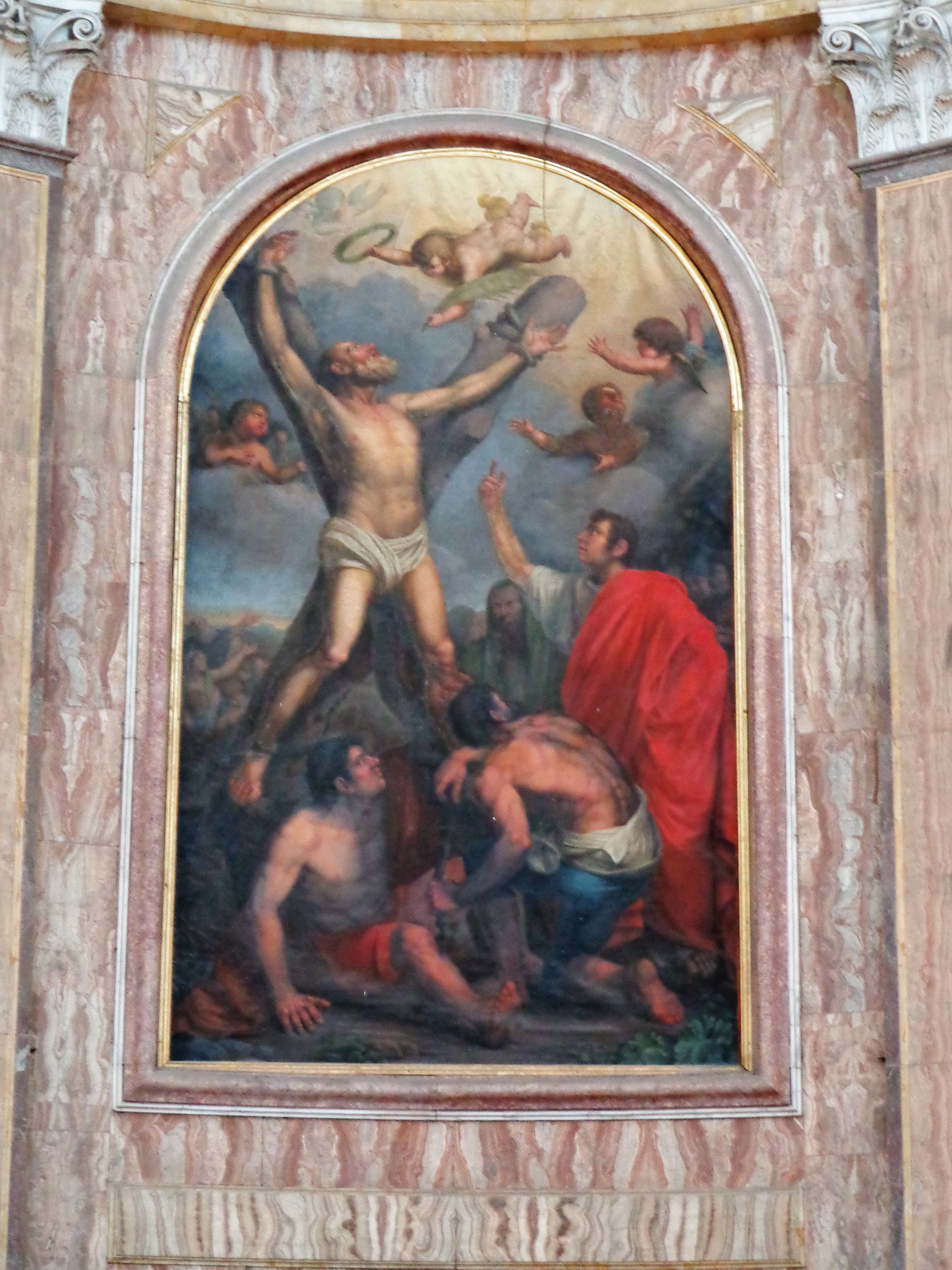 Martirio di Sant'Andrea, dipinto opera di Ferdinando Boudard, Cappella di Sant'Andrea.